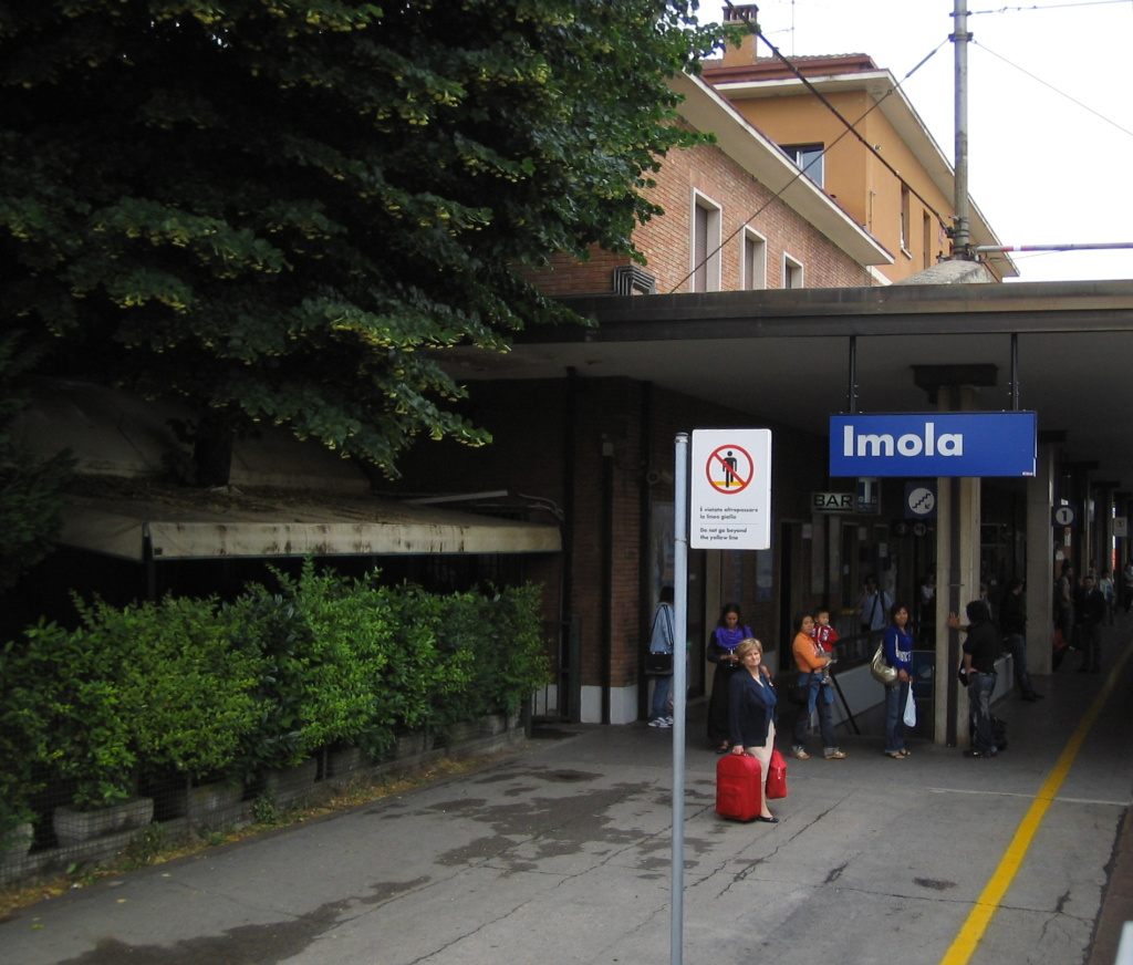 Stazione di Imola (binario 1)